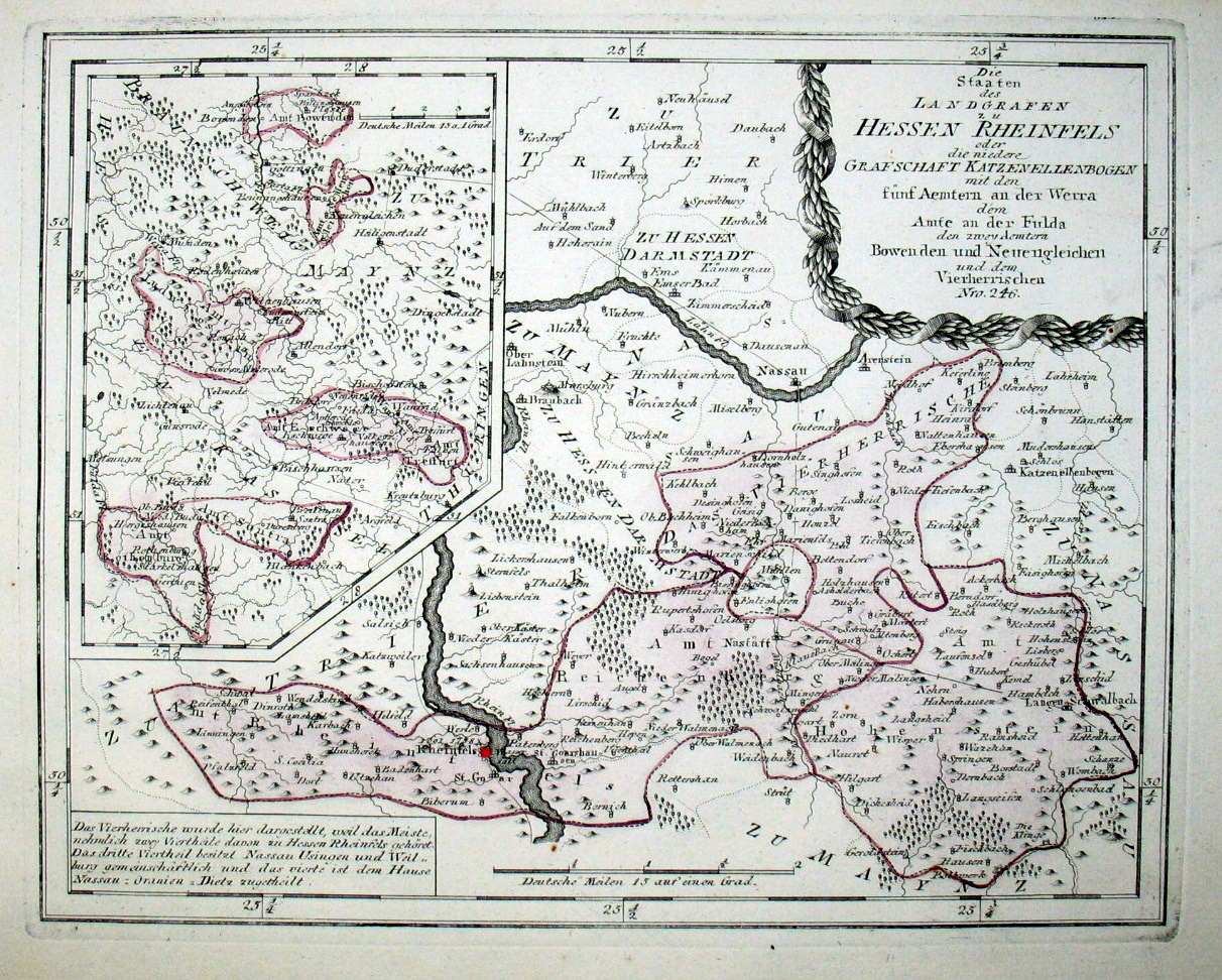 Die Staaten des Landgrafen zu Hessen-Rheinfels oder die niedere Grafschaft Katzenellenbogen mit den fünf Aemtern an der Werra dem Amte an der Fulda den zwey Aemtern Bowenden und Neuengleichen und dem Vierherrischen. Nro. 246. Kolorierter Kupferstich, 30 × 24 cm